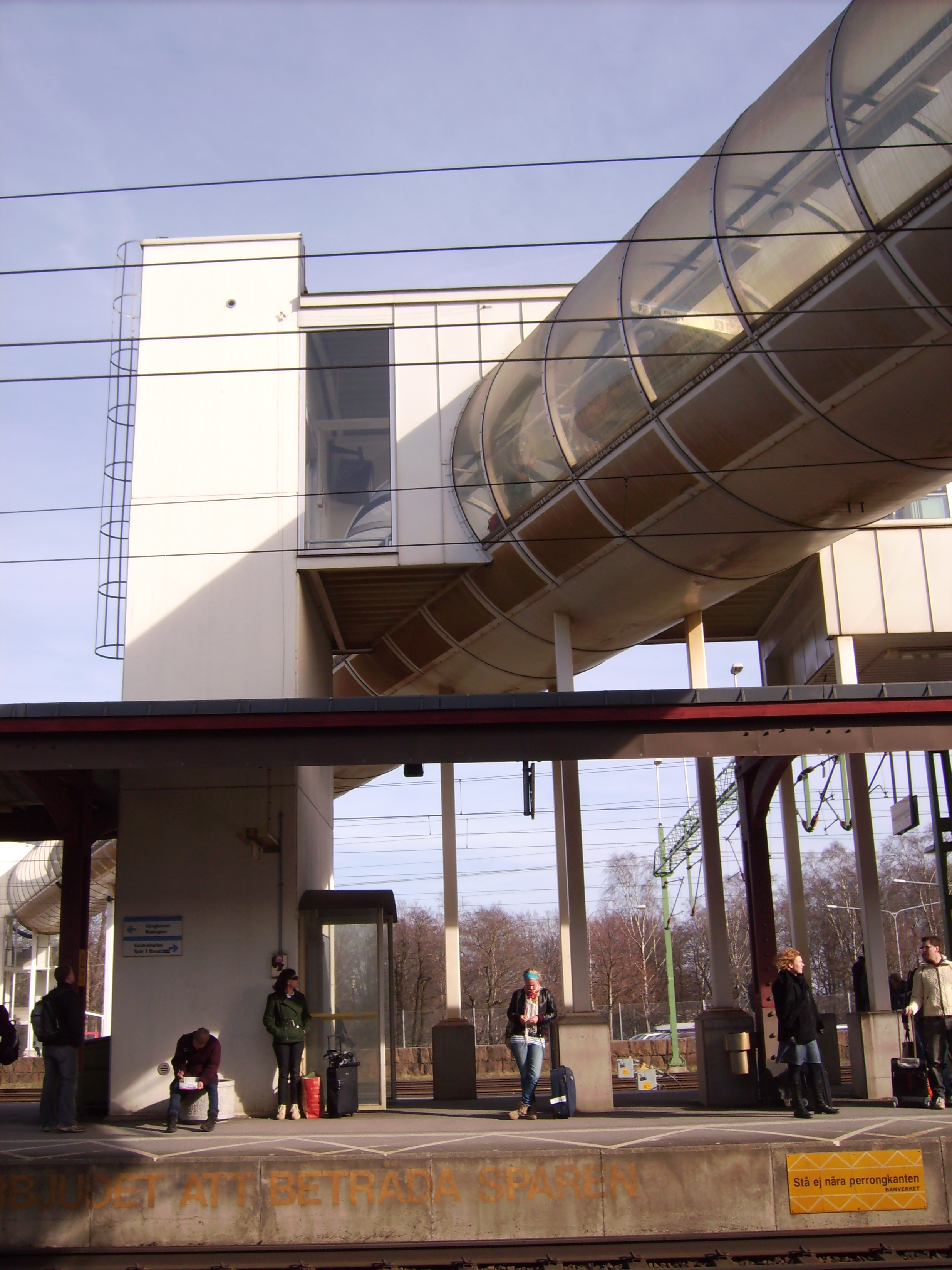 Bilden är fotograferad av Harri Blomberg. Photo by Harri Blomberg.